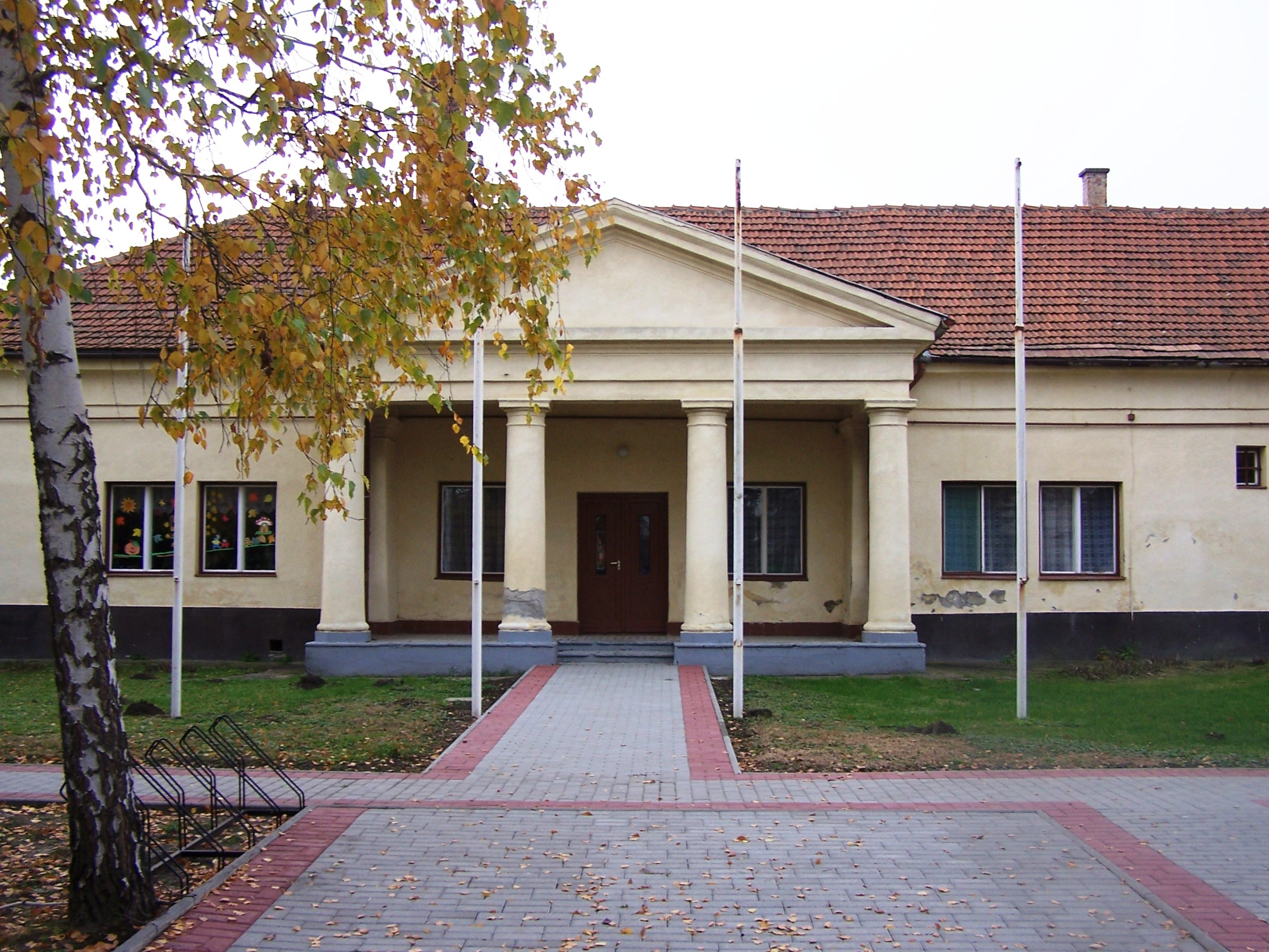 Both-Bagi-kúria (Domony, Fő utca 98.) This is a photo of a monument in Hungary. Identifier: 6996